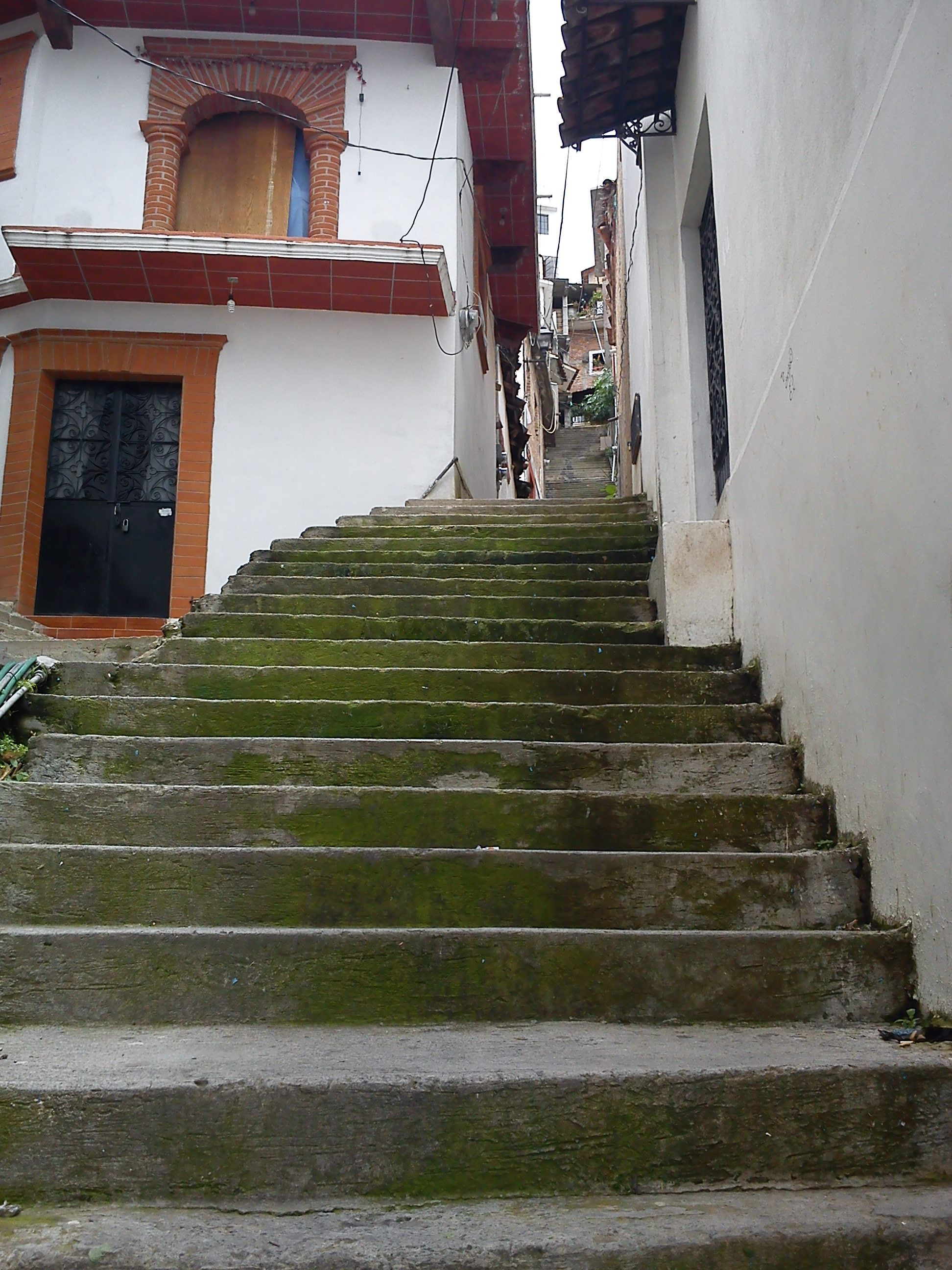 las 100 escaleras